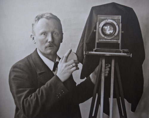 Karl Kaser (1861 - 1942), Český a rakouský právník a fotograf.